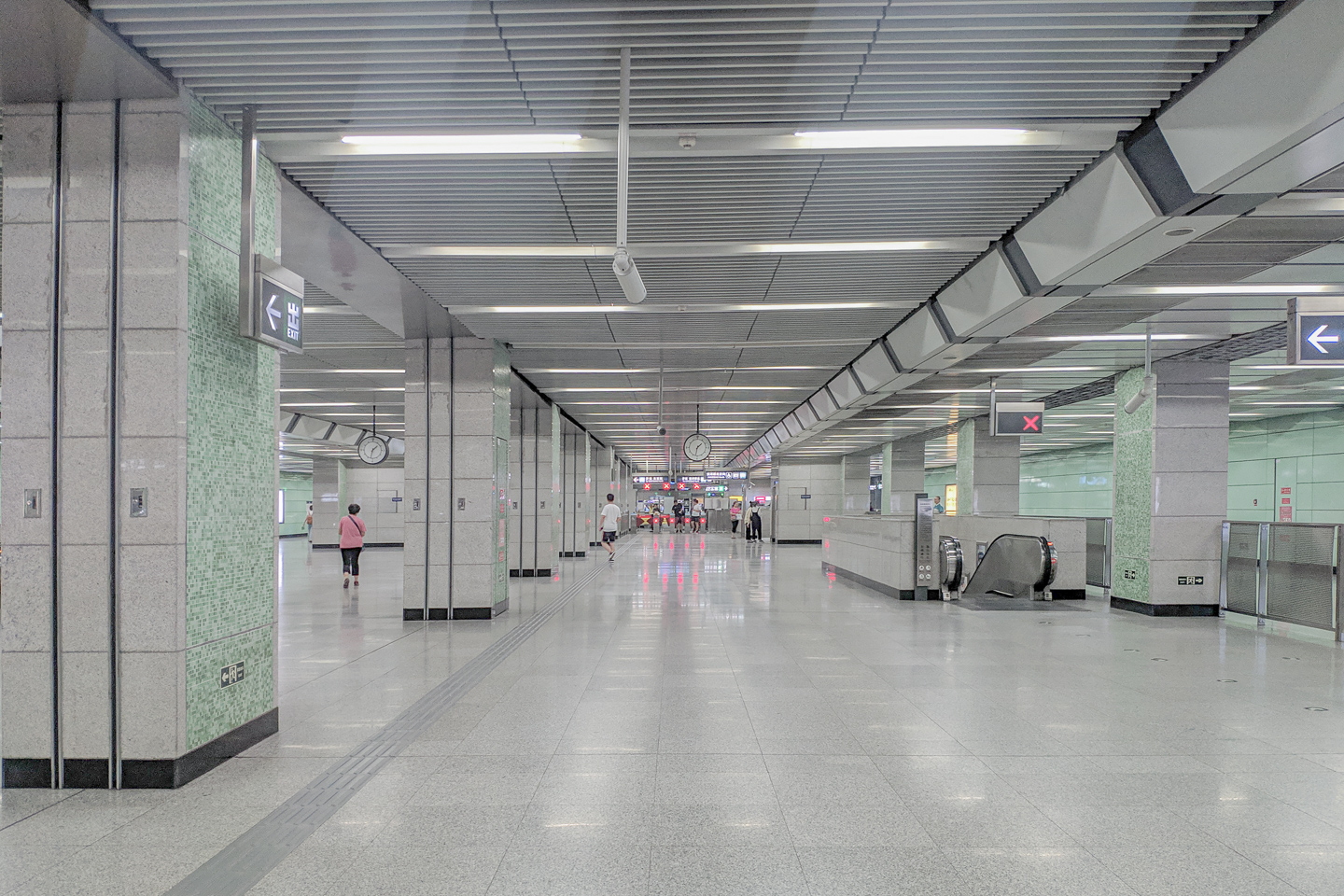 中文（中国大陆）: 北京地铁4号线（大兴线）公益西桥站站厅